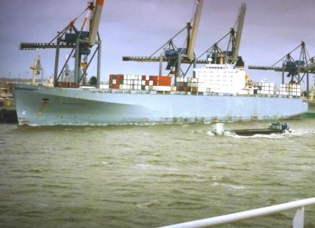 Transvaal an der Containerpier in Bremerhaven